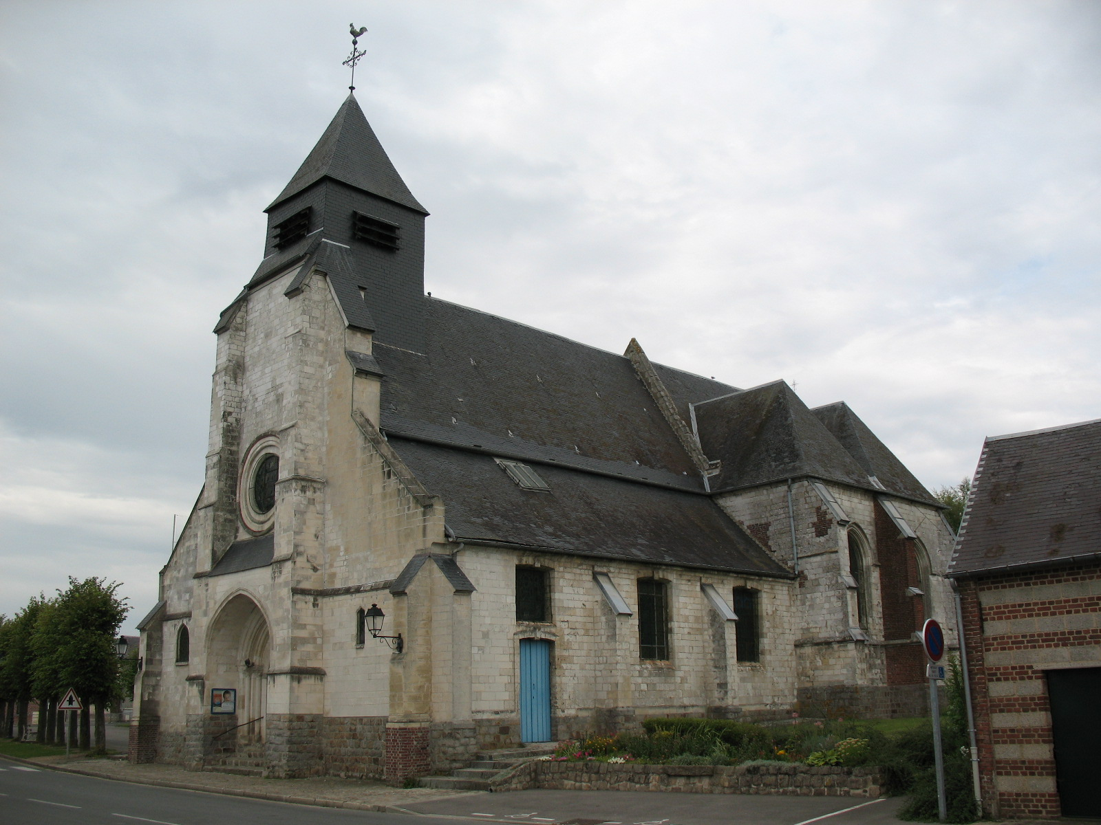 Edifice gothique flamboyant. La façade et la nef sont du XIIIe siècle. Les ouvertures du côté sud, sont du XVIIIe siècle.